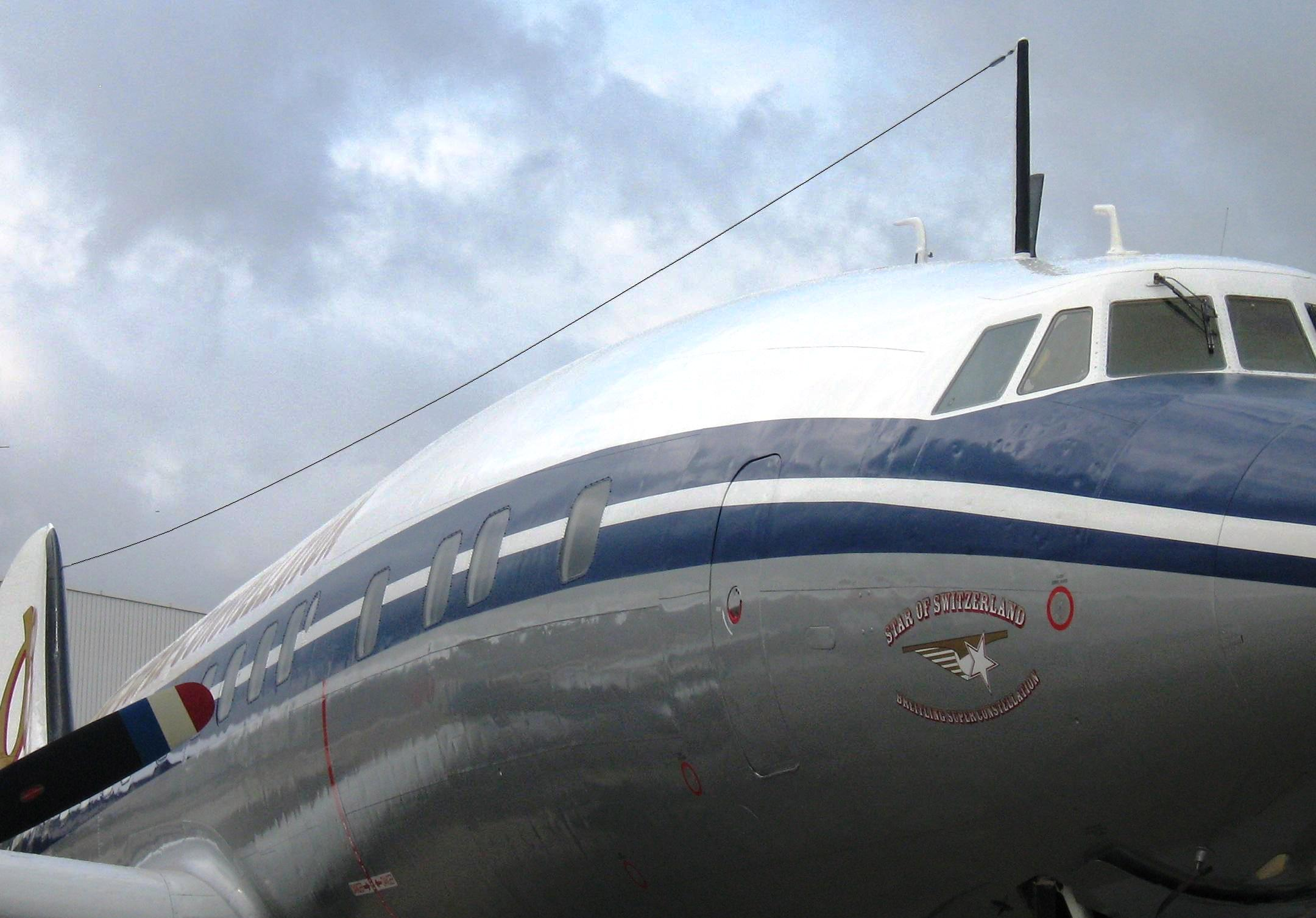 Antenne d'avion au Bourget au Salon international de l'aéronautique et de l'espace 2011 Photograph taken at: Paris Air Show, 20 June 2011–26 June 2011